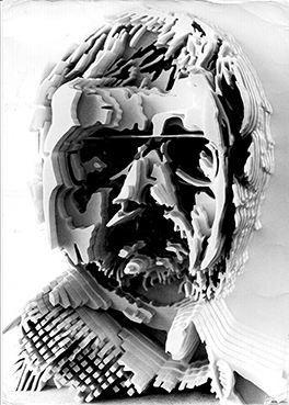 Klaus Kammerichs, Selbstportrait, 1974, Skulptur